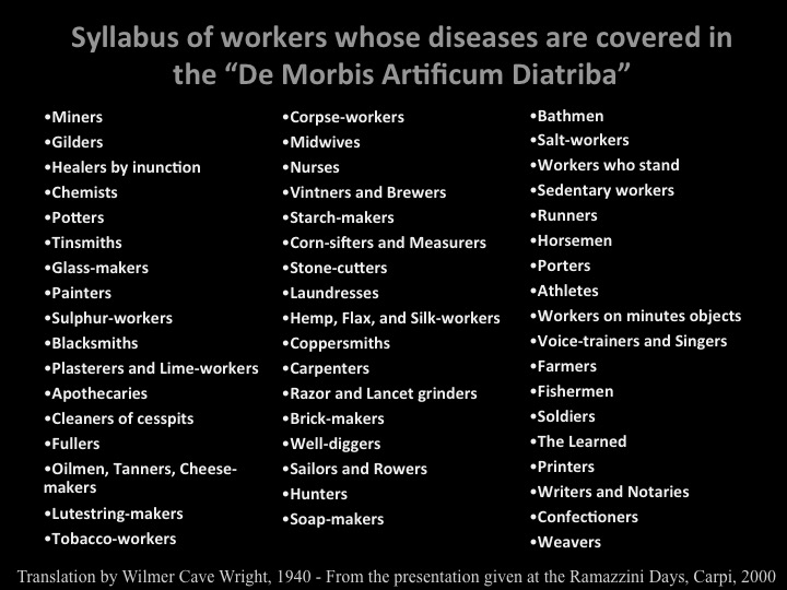 Workers syllabus